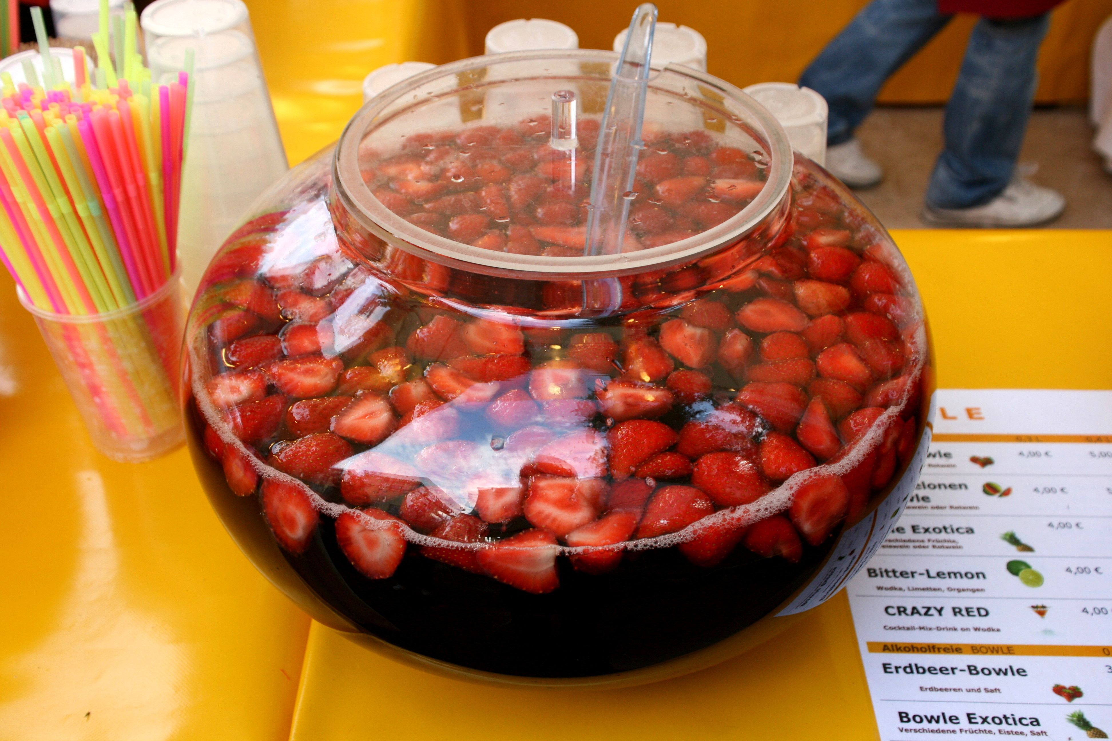 1. Hückeswagener Bierbörse, Bahnhofstraße und Bahnhofplatz in Hückeswagen